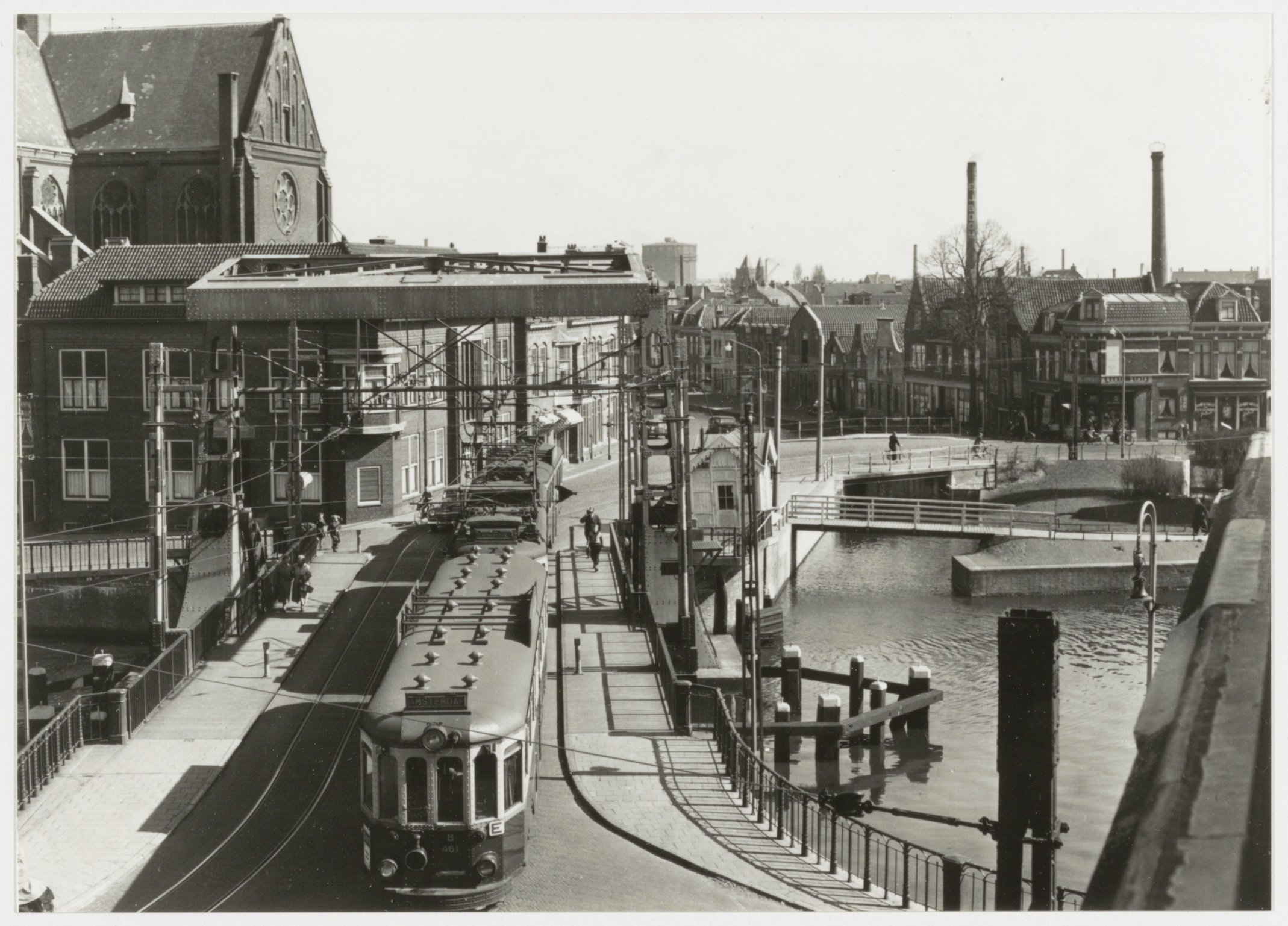 CollectieCollectie Fotoburo de BoerInventarisnummerNL-HlmNHA_54035343BeschrijvingBudapester stel van de NZH (blauwe tram) passeert de Langebrug en rijdt richting Herensingel, op weg naar Amsterdam.FotonummerNL-HlmNHA_1478_3237DocumenttypeTopografische prenten, tekeningen en foto'sVervaardigerFotopersbureau de Boer, Boer, Cees de (1918-1985) Soort vervaardigerFotograaf AnnotatiesHD110295LandNederland ProvincieNoord-Holland GemeenteHaarlem PlaatsHaarlem GeografischBurgwalbuurt Begindatum1953Einddatum1953TechniekFoto Trefwoordenstraatgezichten, trams, openbaar vervoer, Bruggen